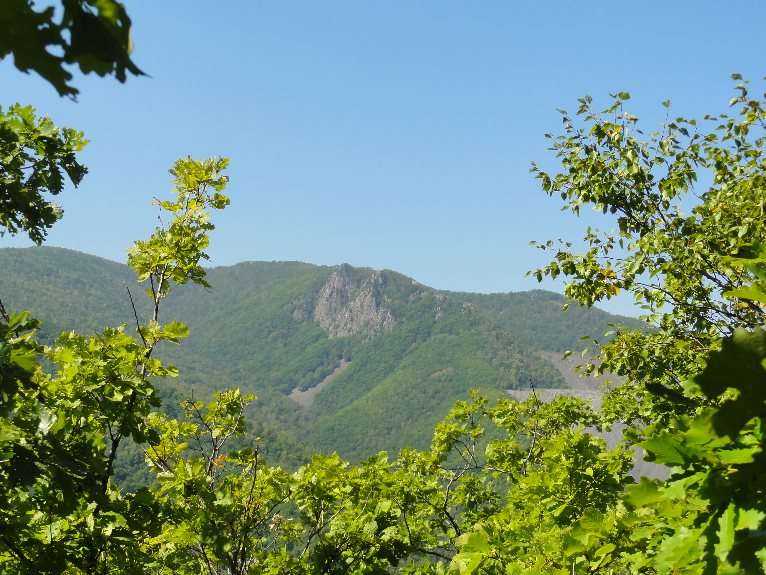 Дубняки Центрального Сихотэ-Алиня